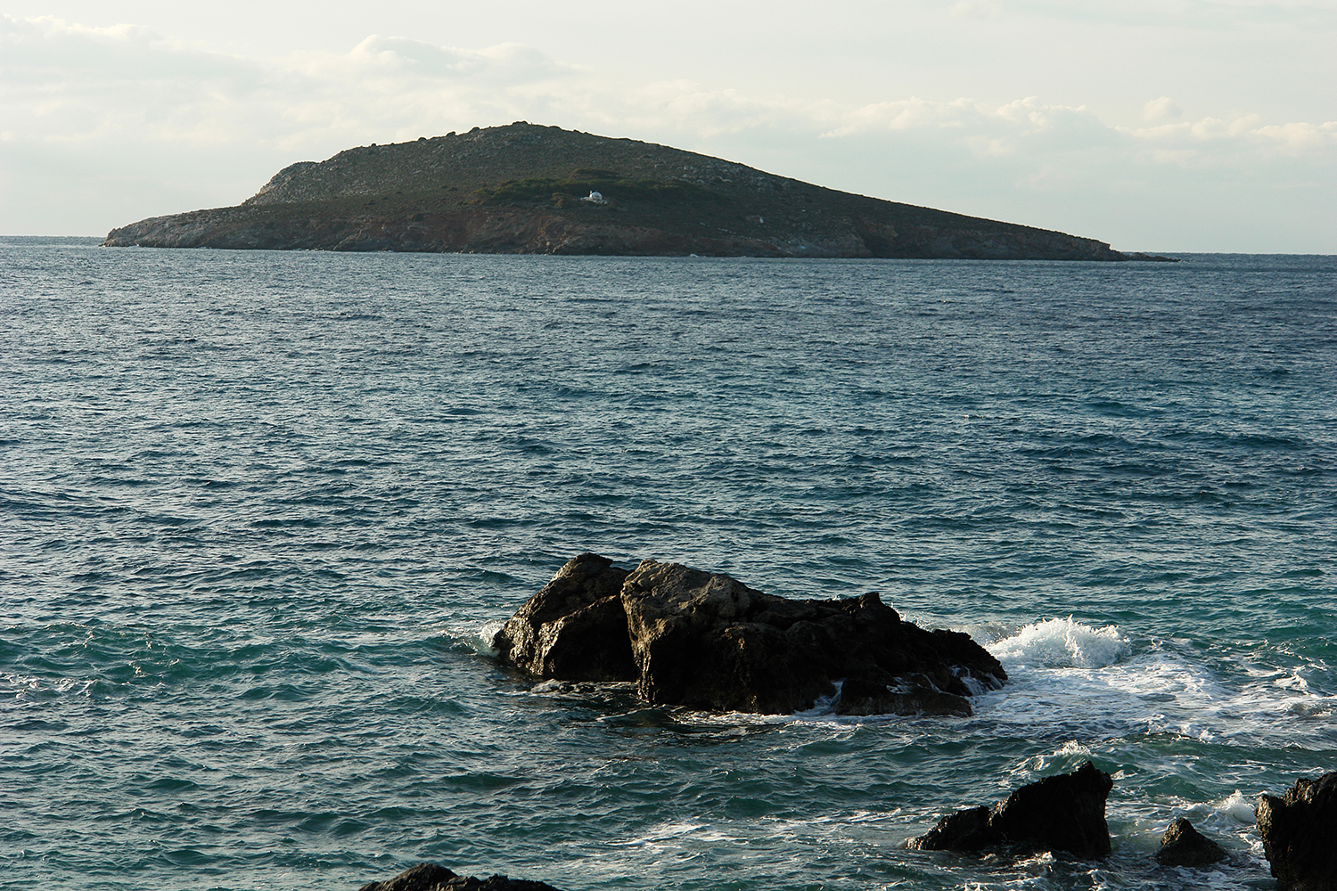 Θέα από Πλατύ Γιαλό